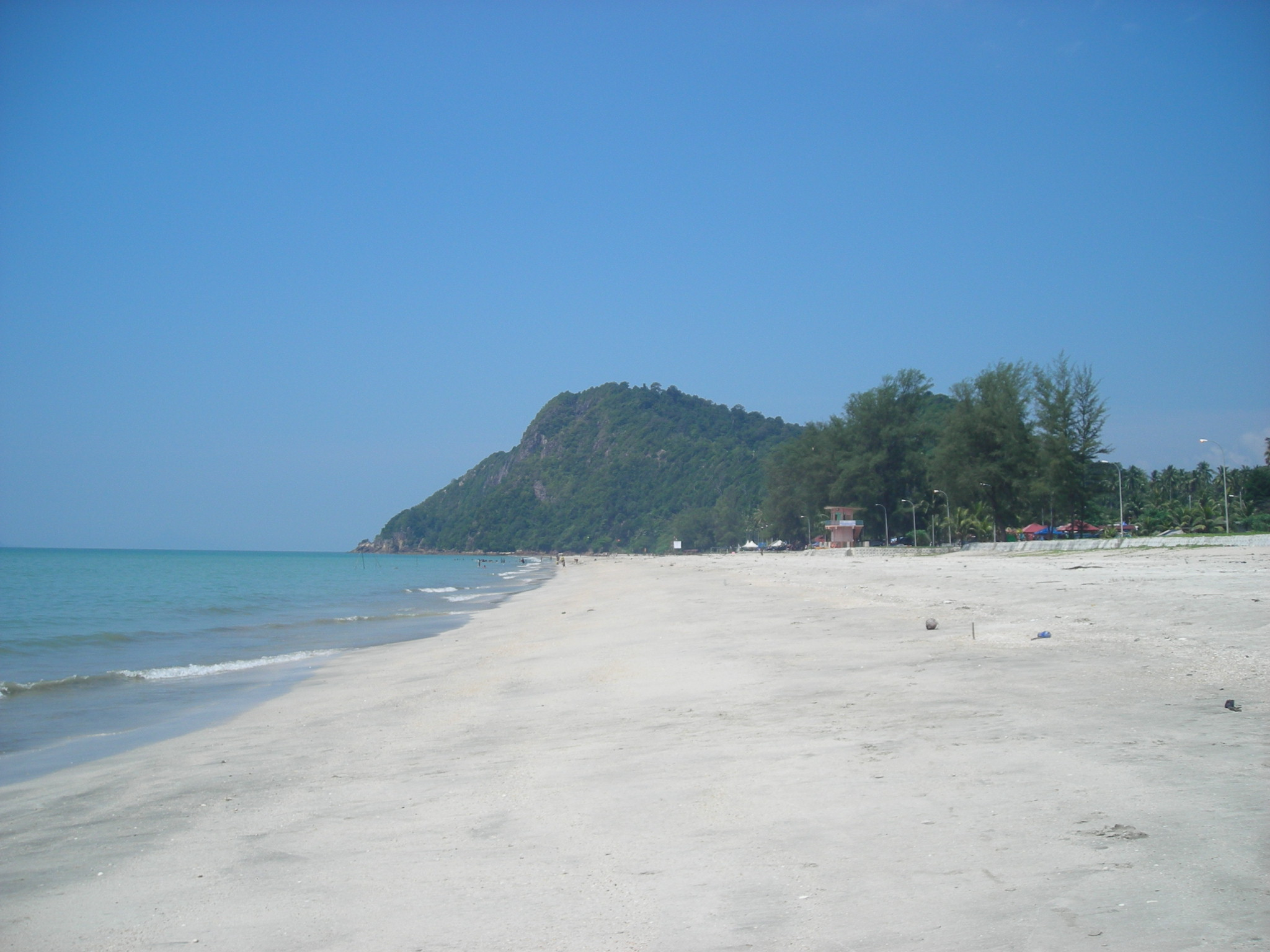 Pantai Air Papan.